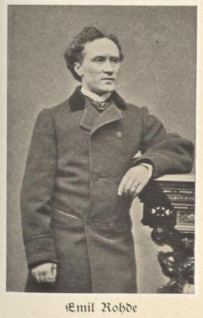 Emil Rohde (1839-1913), königlich bayerischer Hofschauspieler, München